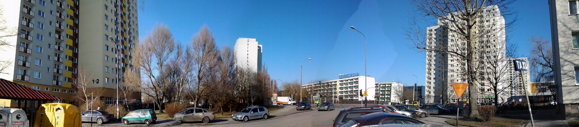 Os. Oświecenia, Poznań.